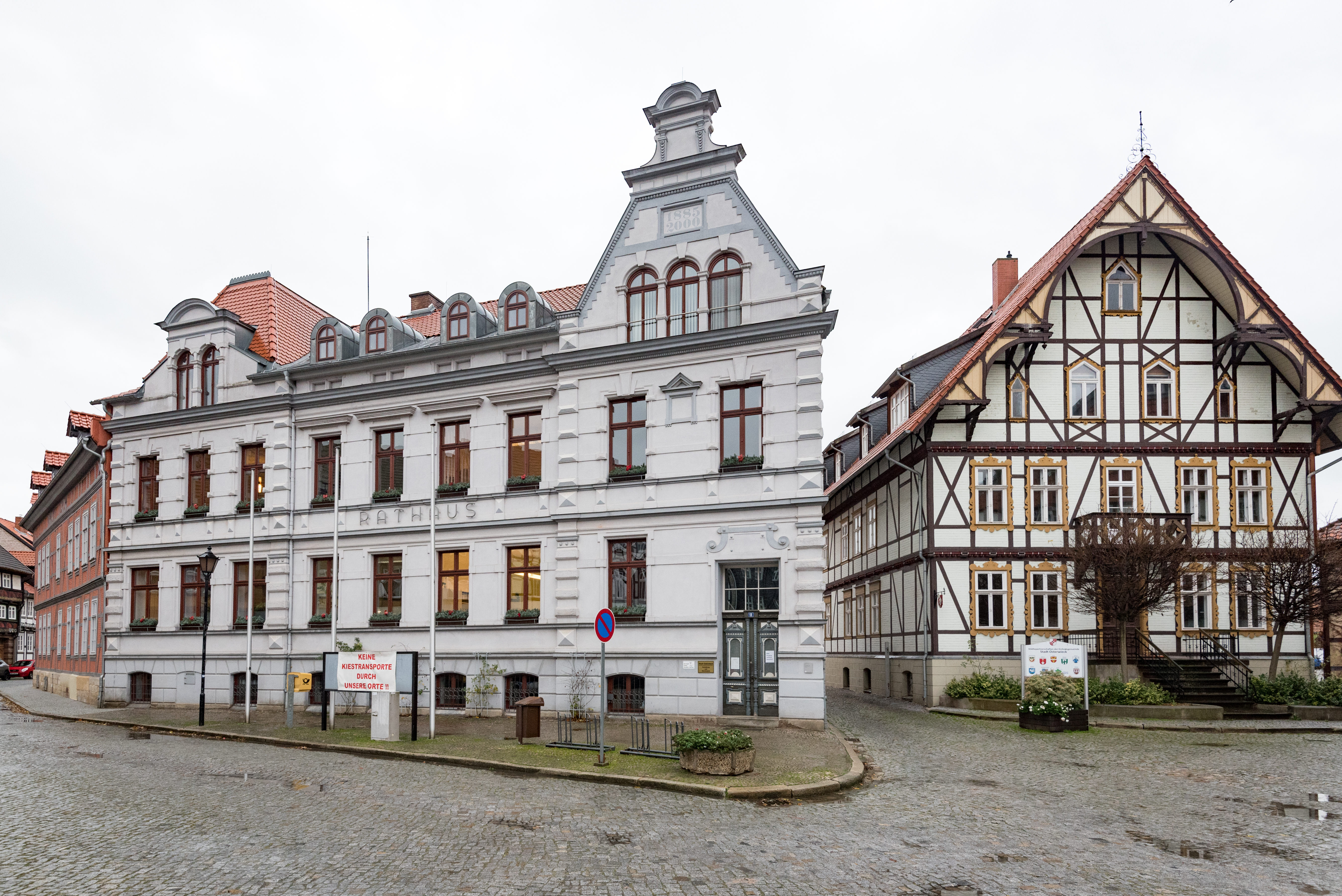 Osterwieck, Am Markt 11